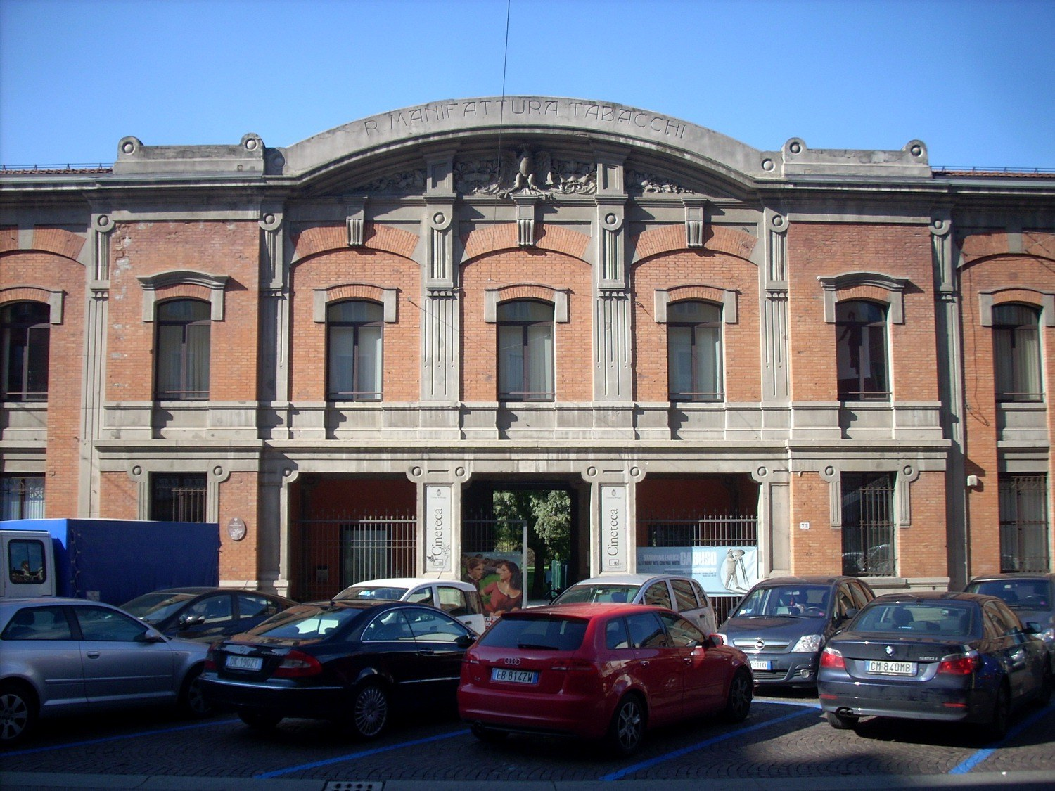 Cineteca di Bologna - Italia.